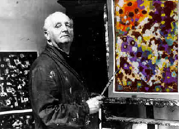 Hans Breinlinger malt "Der Urknall"